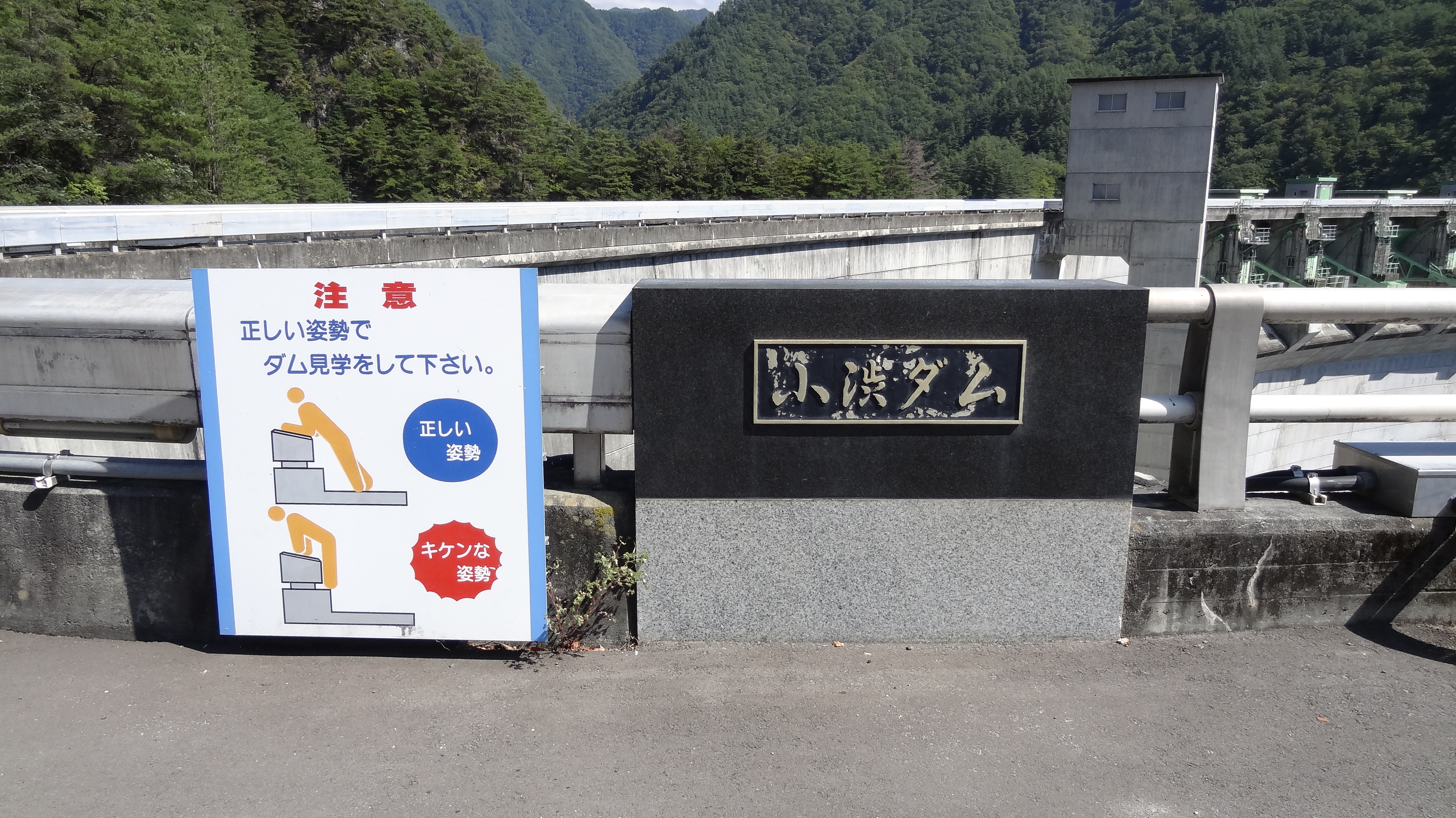 小渋ダム：長野県下伊那郡松川町と上伊那郡中川村との境、天竜川水系小渋川に建設された、高さ105メートルのアーチ式コンクリートダム